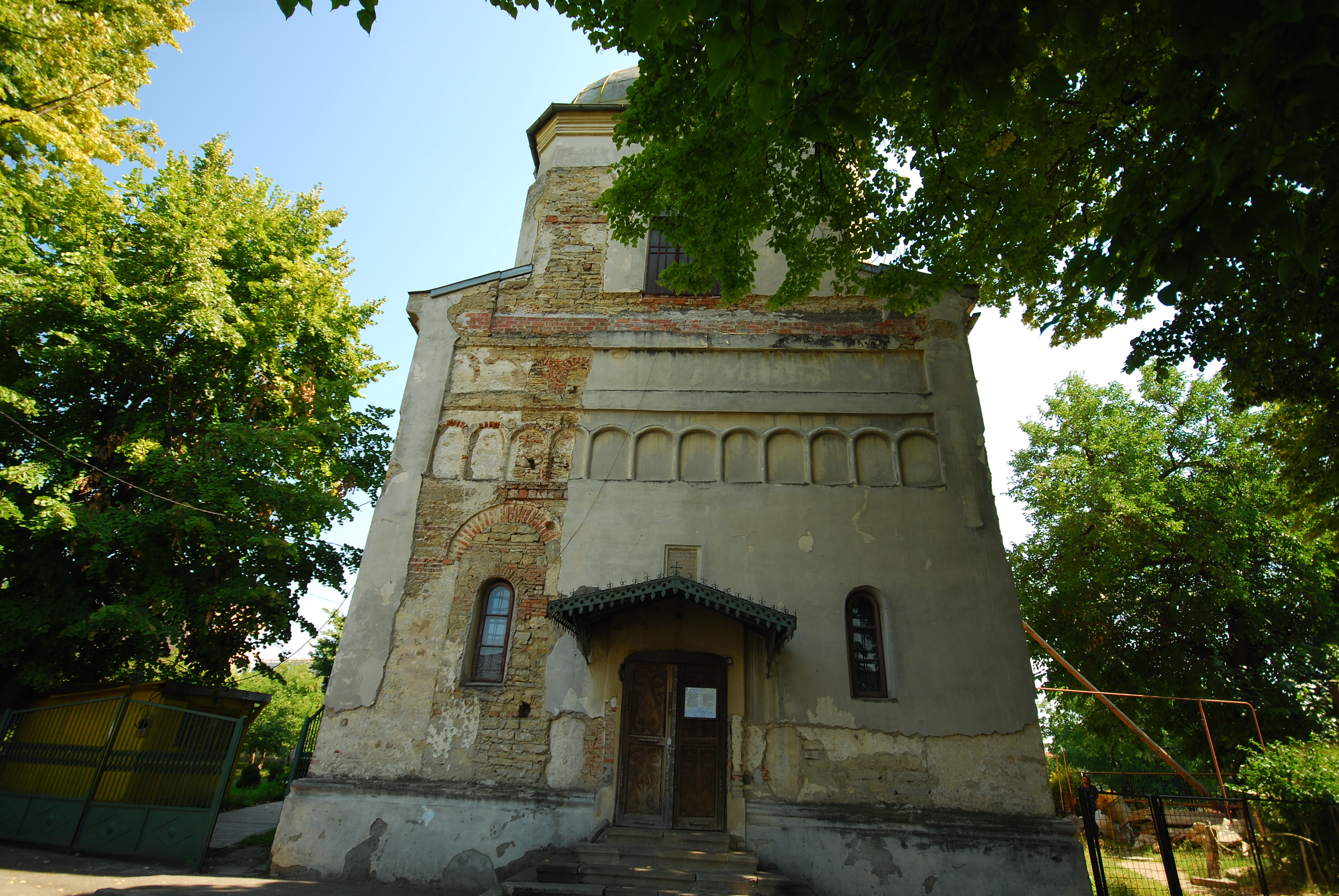 Biserica "Sf. Ioan cel Nou" -Nicorița